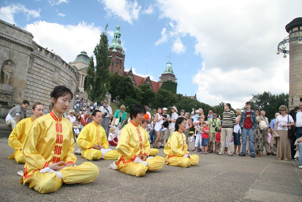 Falun Dafa in Szczecin, Poland